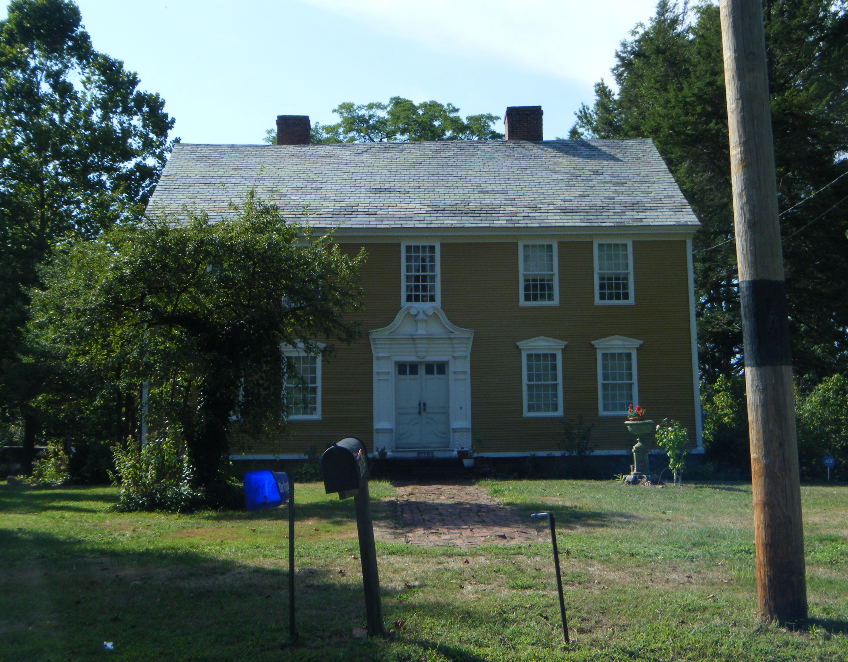 Ebenezer Grant House in South Windsor, CT.